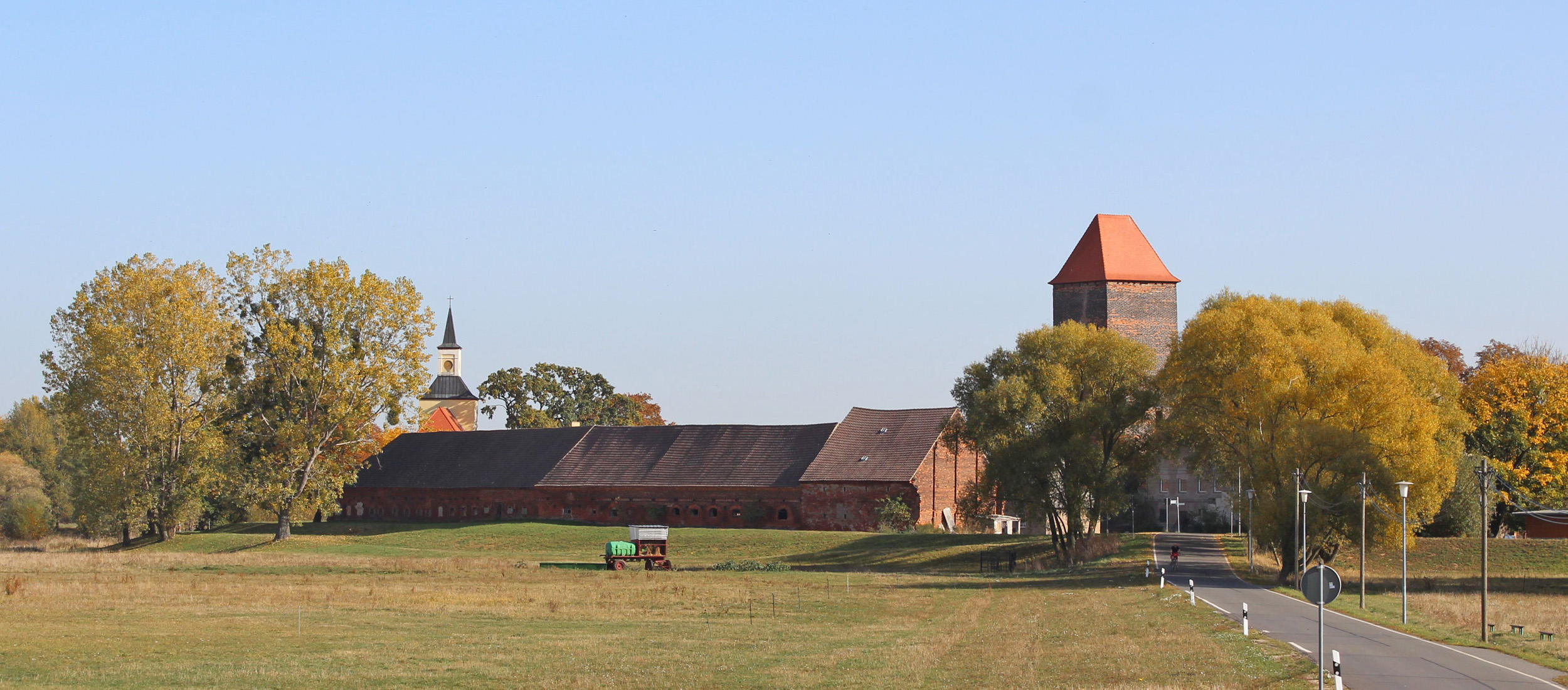 Das Landschaftsschutzgebiet Mittlere Mulde am Fährhaus in Gruna.